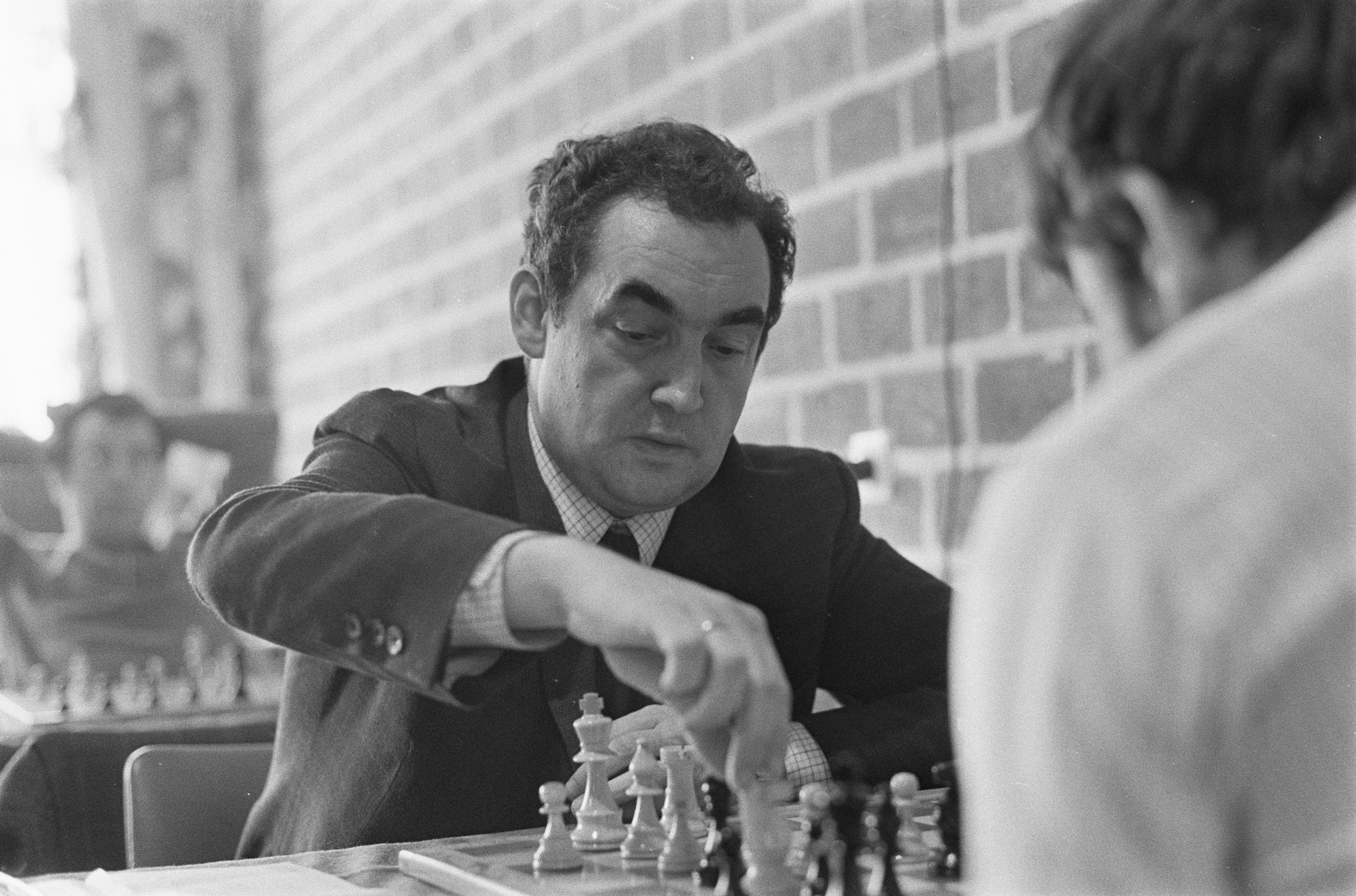 Collectie / Archief : Fotocollectie Anefo Reportage / Serie : [ onbekend ] Beschrijving : Hoogoven Schaaktoernooi Beverwijk. Mark Taimanov (SU) aan zet Datum : 31 januari 1970 Locatie : Beverwijk Trefwoorden : schaken, sport Persoonsnaam : Taimanov, Mark Fotograaf : Evers, Joost / Anefo Auteursrechthebbende : Nationaal Archief Materiaalsoort : Negatief (zwart/wit) Nummer archiefinventaris : bekijk toegang 2.24.01.05 Bestanddeelnummer : 923-2049